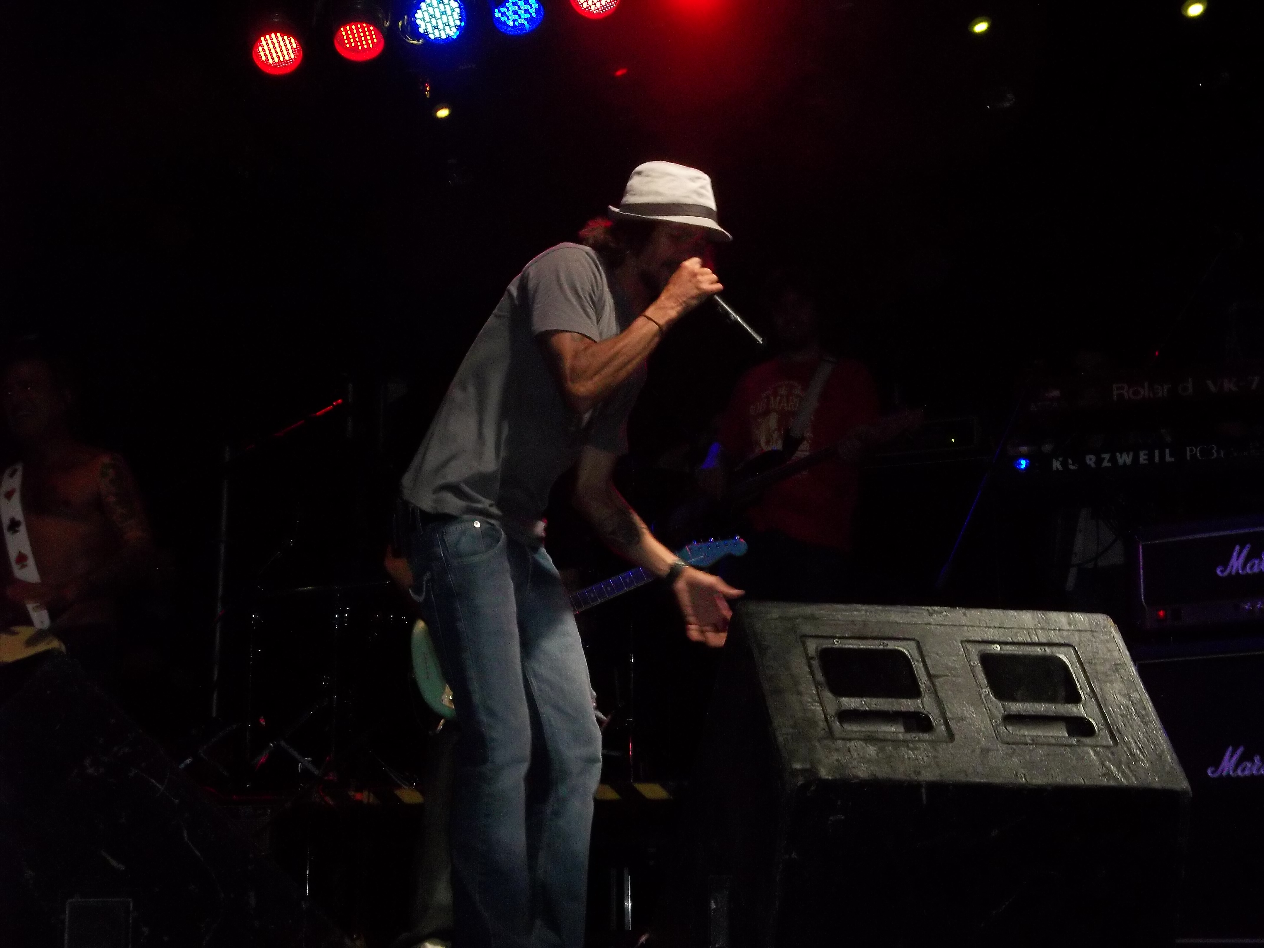 Armandinho cantando en Polo Prado.